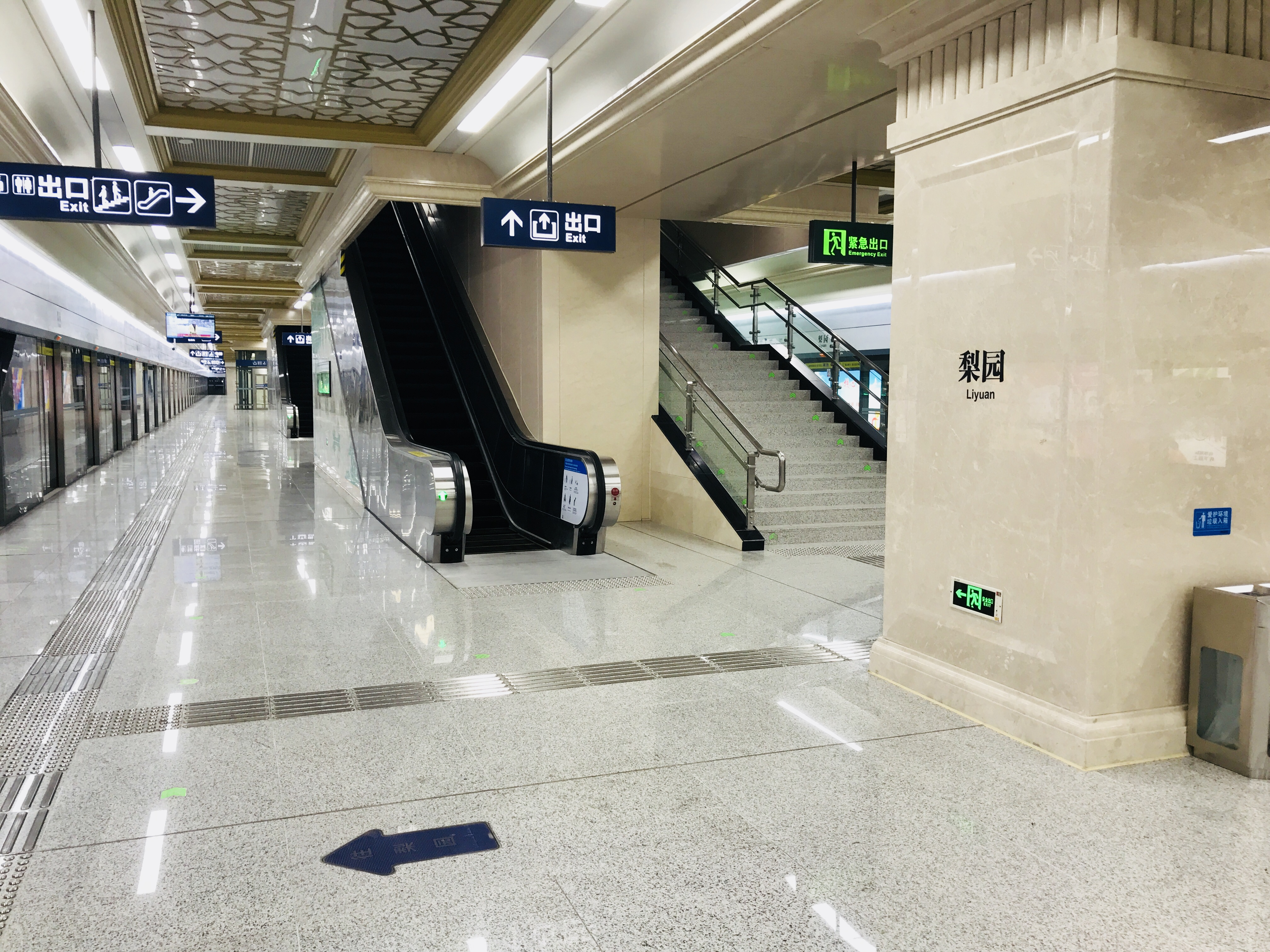 武汉地铁梨园站